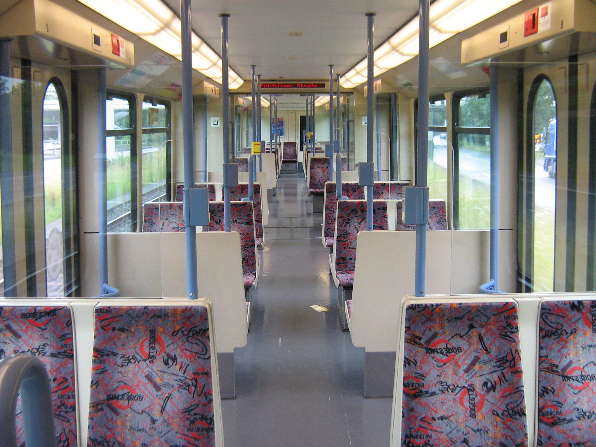 Ein B-Wagen der Bogestra von innen